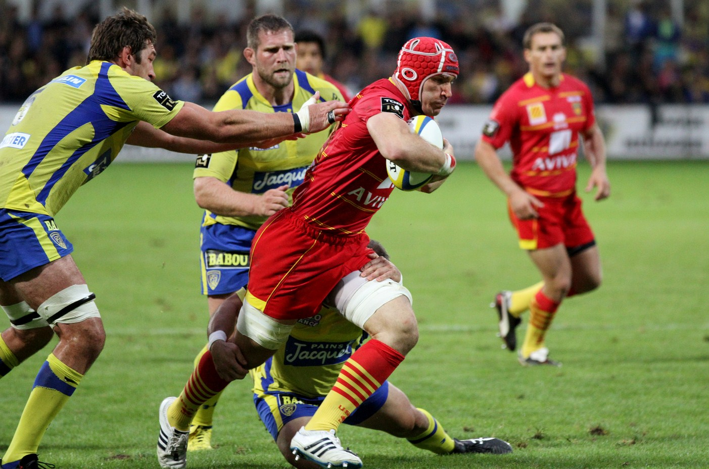 Charge d'Alasdair Strokosch face à Clermont-Ferrand